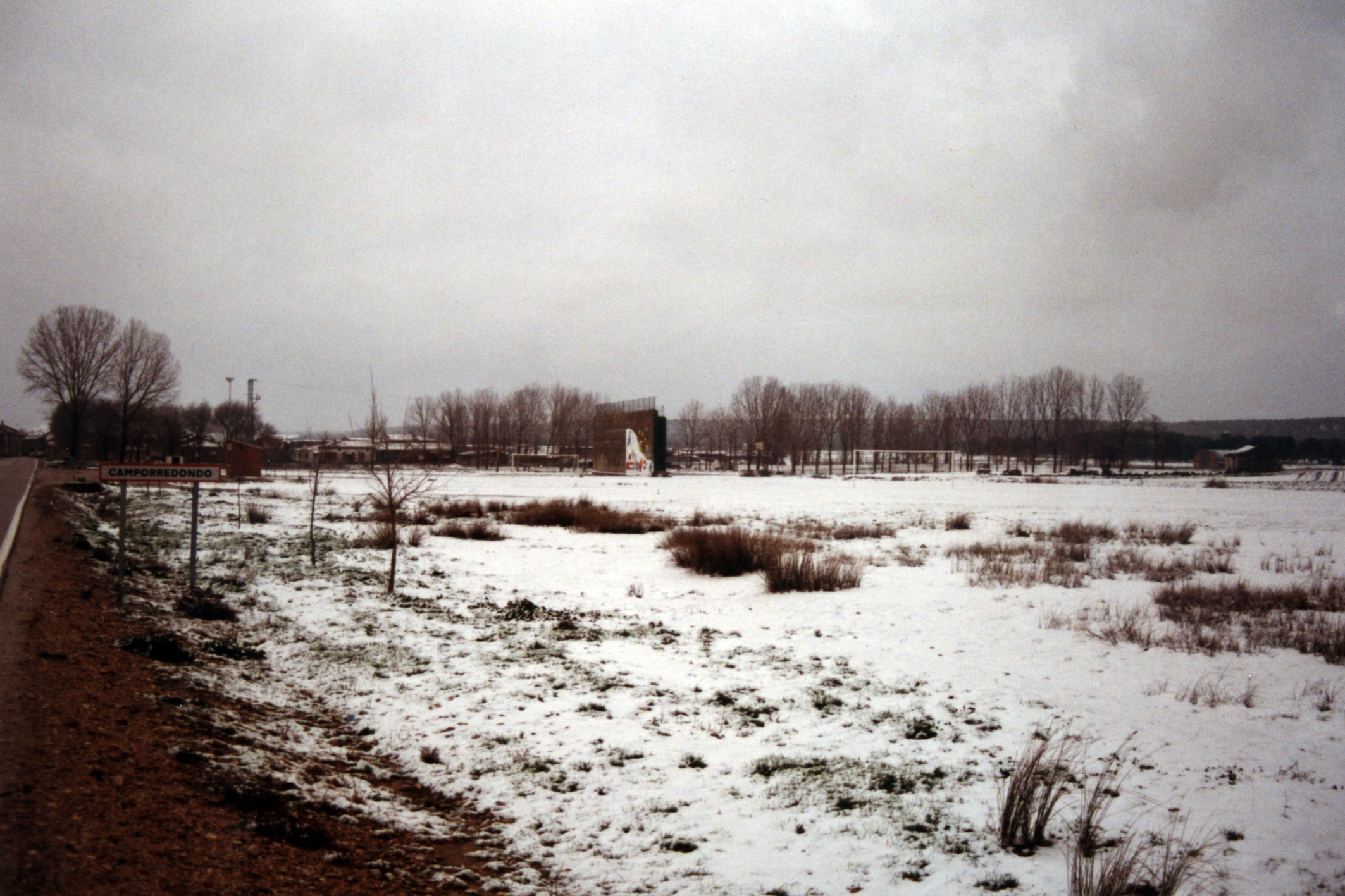 Vista nevada de los alrededores del pueblo de Camporredondo en Valladolid (España). Puede verse el frontón.